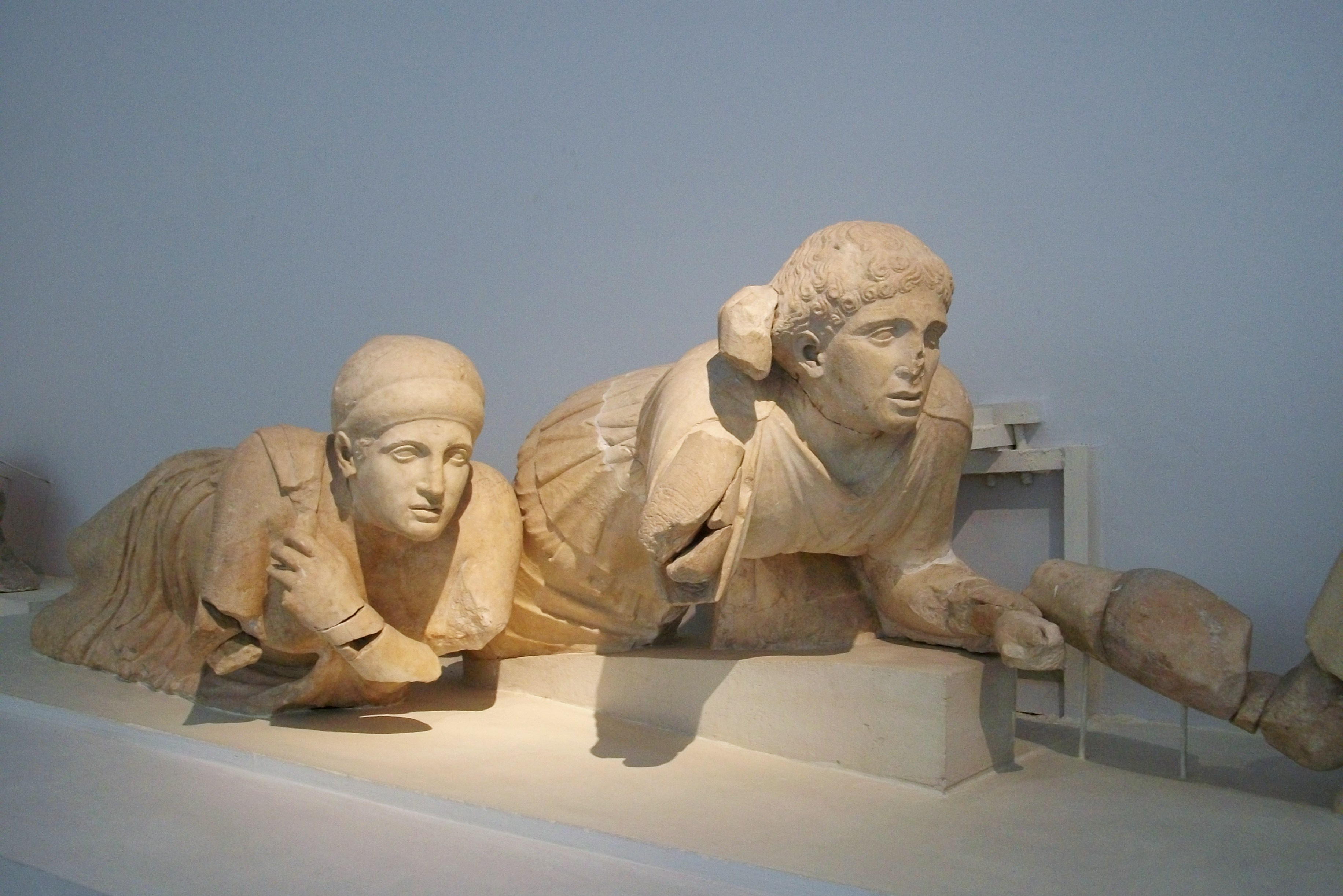 Dones làpites, frontó occidental del temple de Zeus, Olímpia, museu arqueològic.